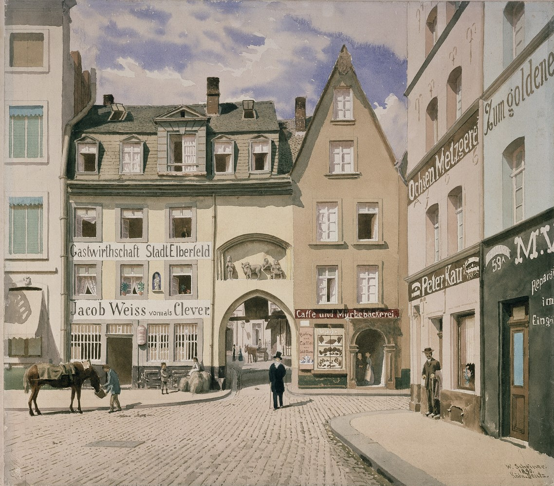 Köln-Heumarkt. Engangstor zur 1903 abgebrochenen Fleischhalle. Über dem Torbogen das Relief der Fleischmenger, im Nebenhaus das Gasthaus „Stadt Elberfeld“